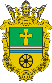 Герб Кривоозерського району